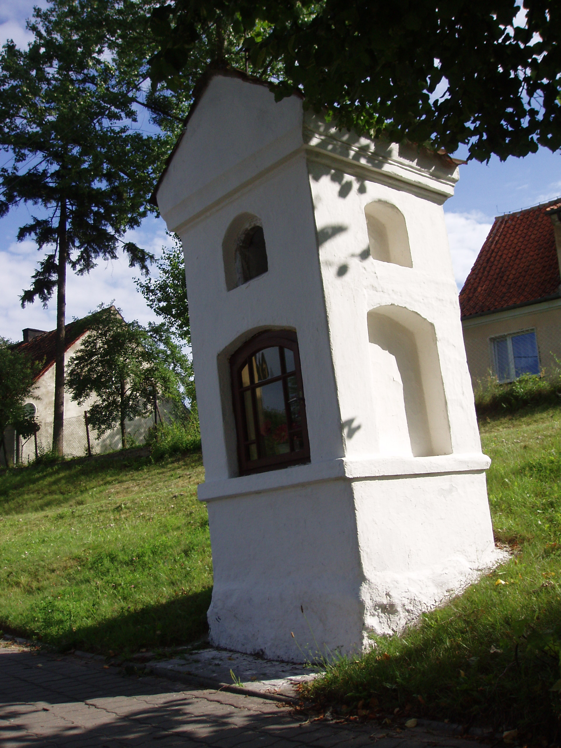 Kapliczka przydrożna w Butrynach